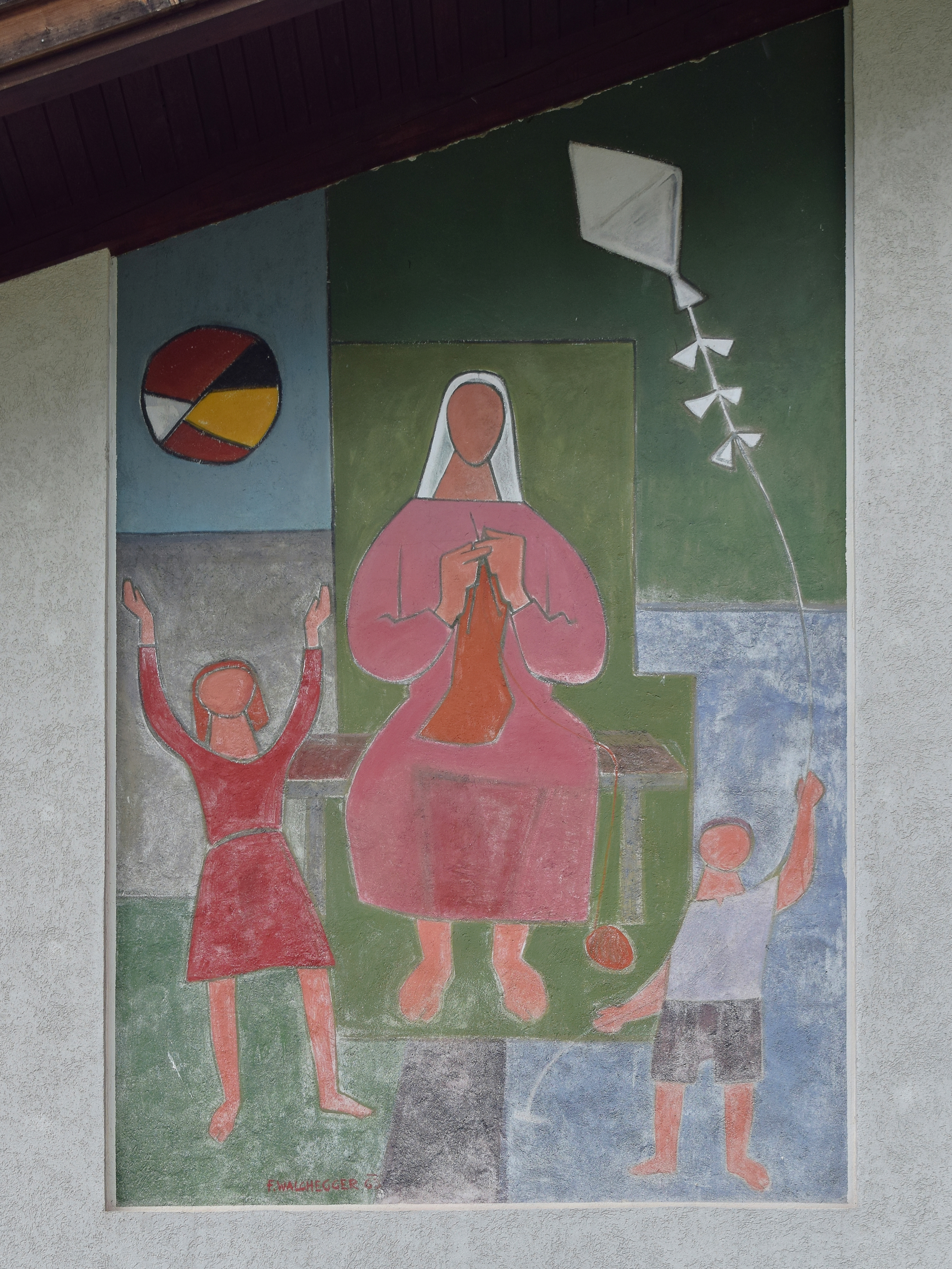 Wandbilder Familie und Arbeitsleben von Franz Walchegger This media shows the remarkable cultural object in the Austrian state of Tyrol listed by the Tyrolean Art Cadastre with the ID 135029. (on tirisMaps, pdf, more images on Commons, Wikidata)